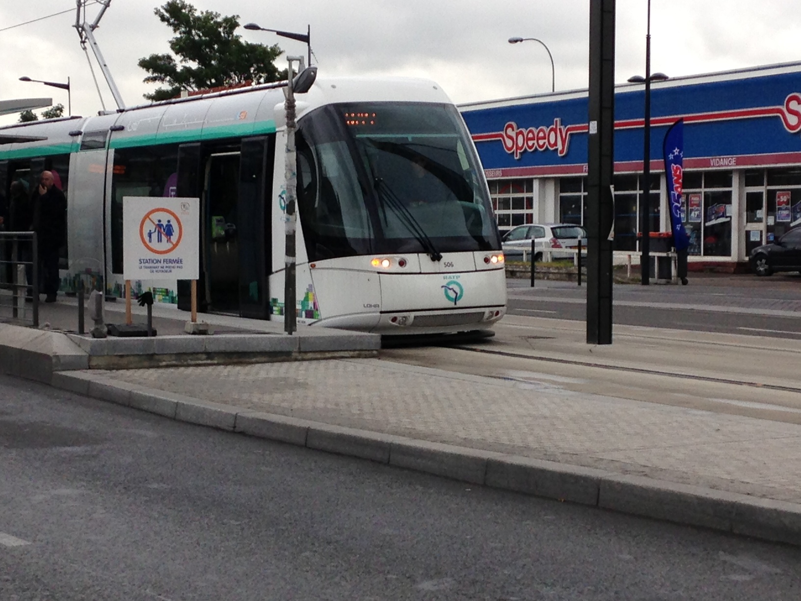 Une rame du tramway T5 en cours d'essais le 16 mai à Pierrefitte-sur-Seine à la station Alcide d'Orbigny